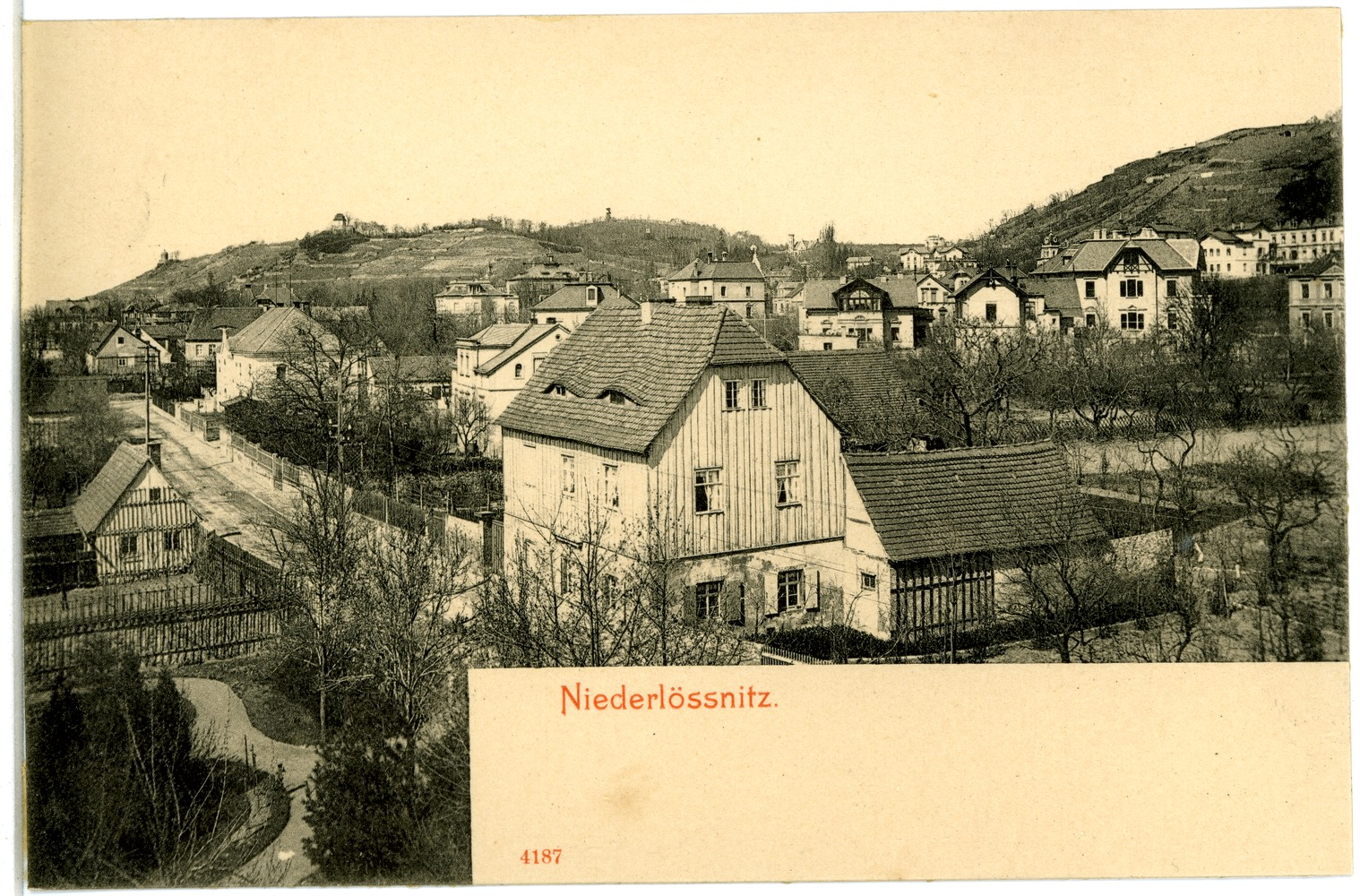 Niederlößnitz; Ortsansicht This postcard is from publisher Brück & Sohn in Meißen ( postcard has a unique number 04187 and is available in a higher resolution at the publisher. This images was uploaded in a cooperation project between Wikipedians and the publisher.